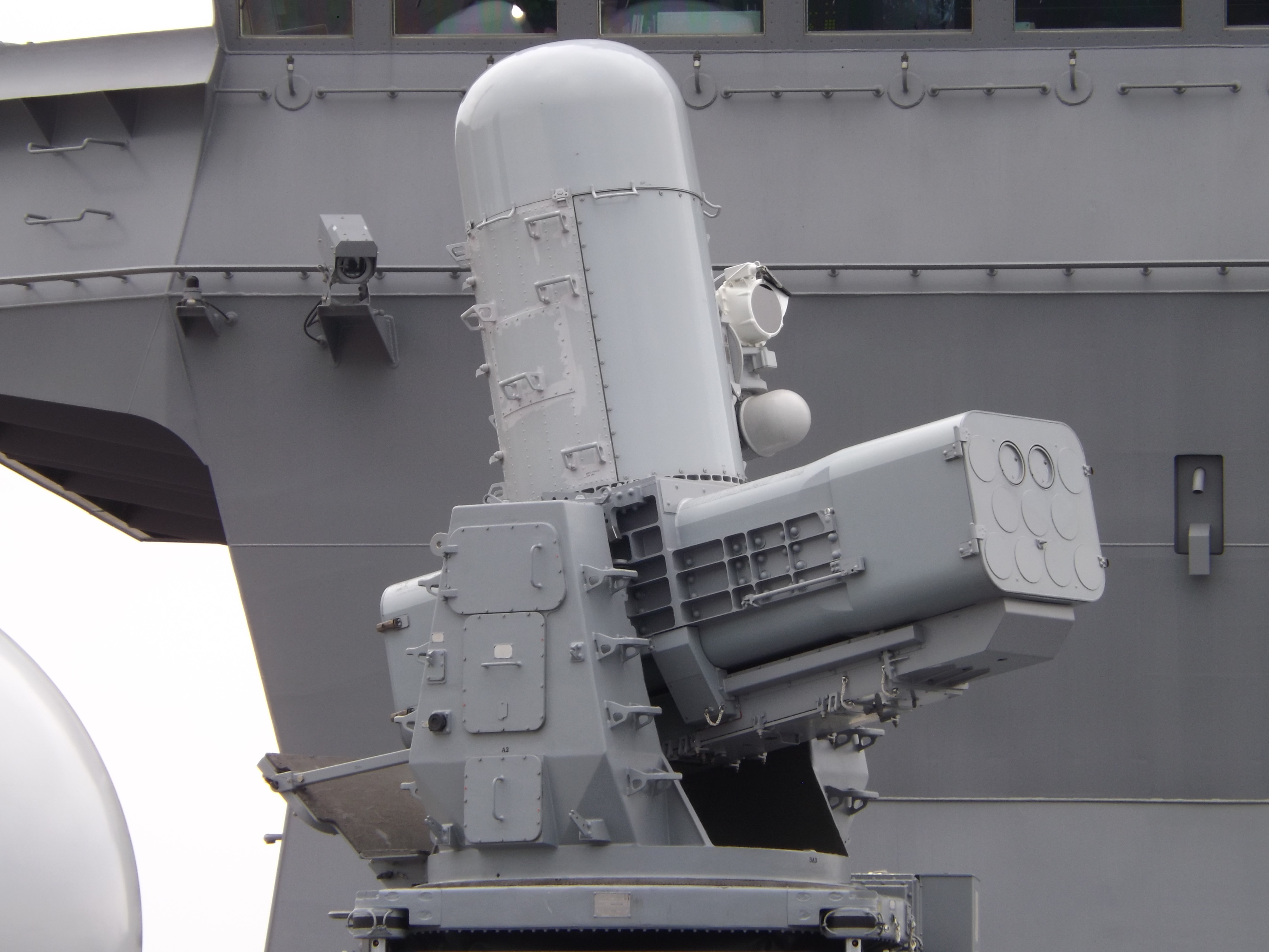 JMSDF DDH-183 SeaRam